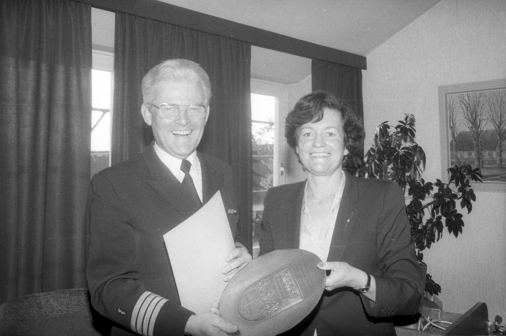 als Chefarzt des Bundeswehrkrankenhauses Kiel durch die Bürgervorsteherin Anke Gravert (rechts).